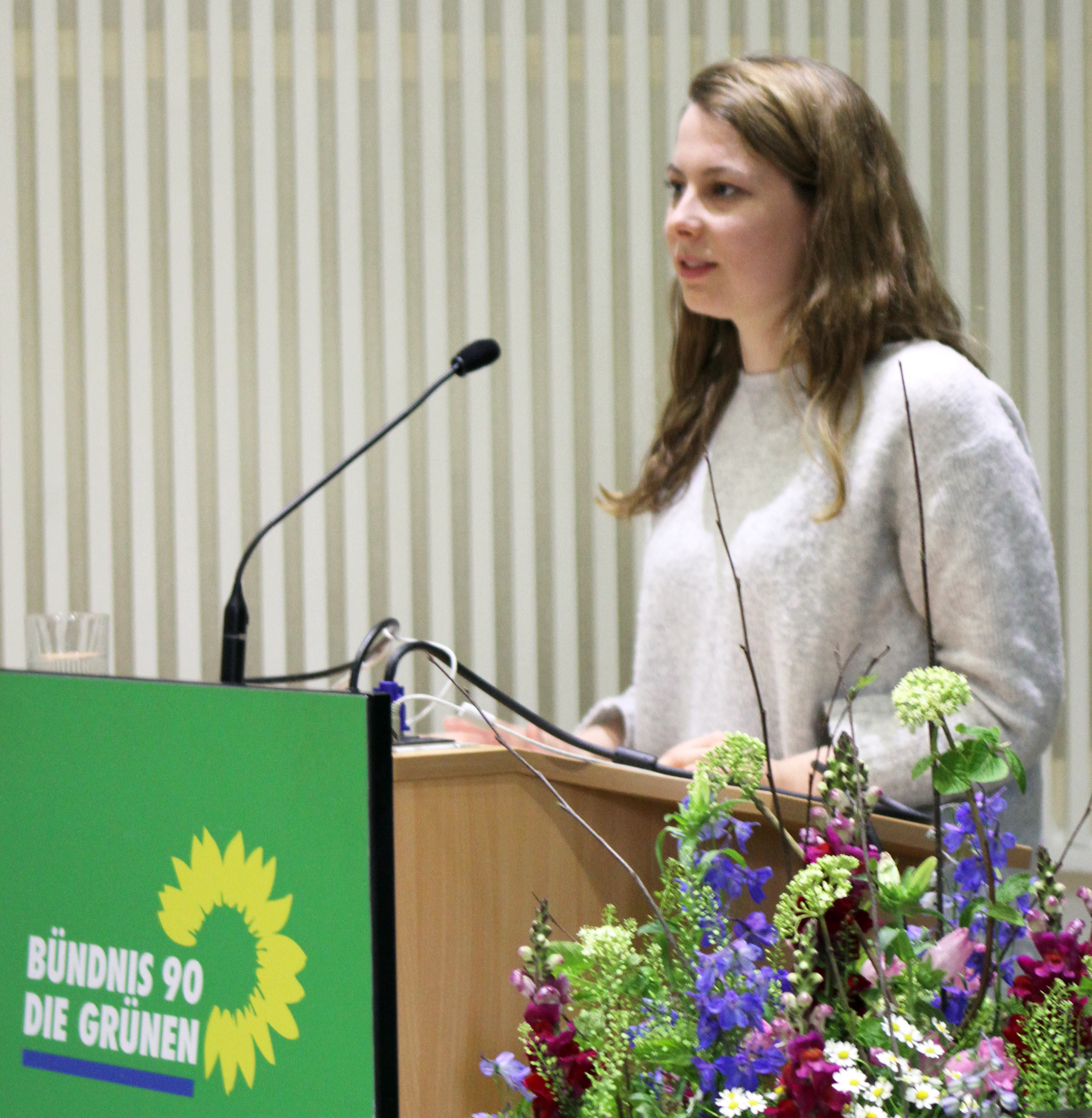 Jamila Schäfer